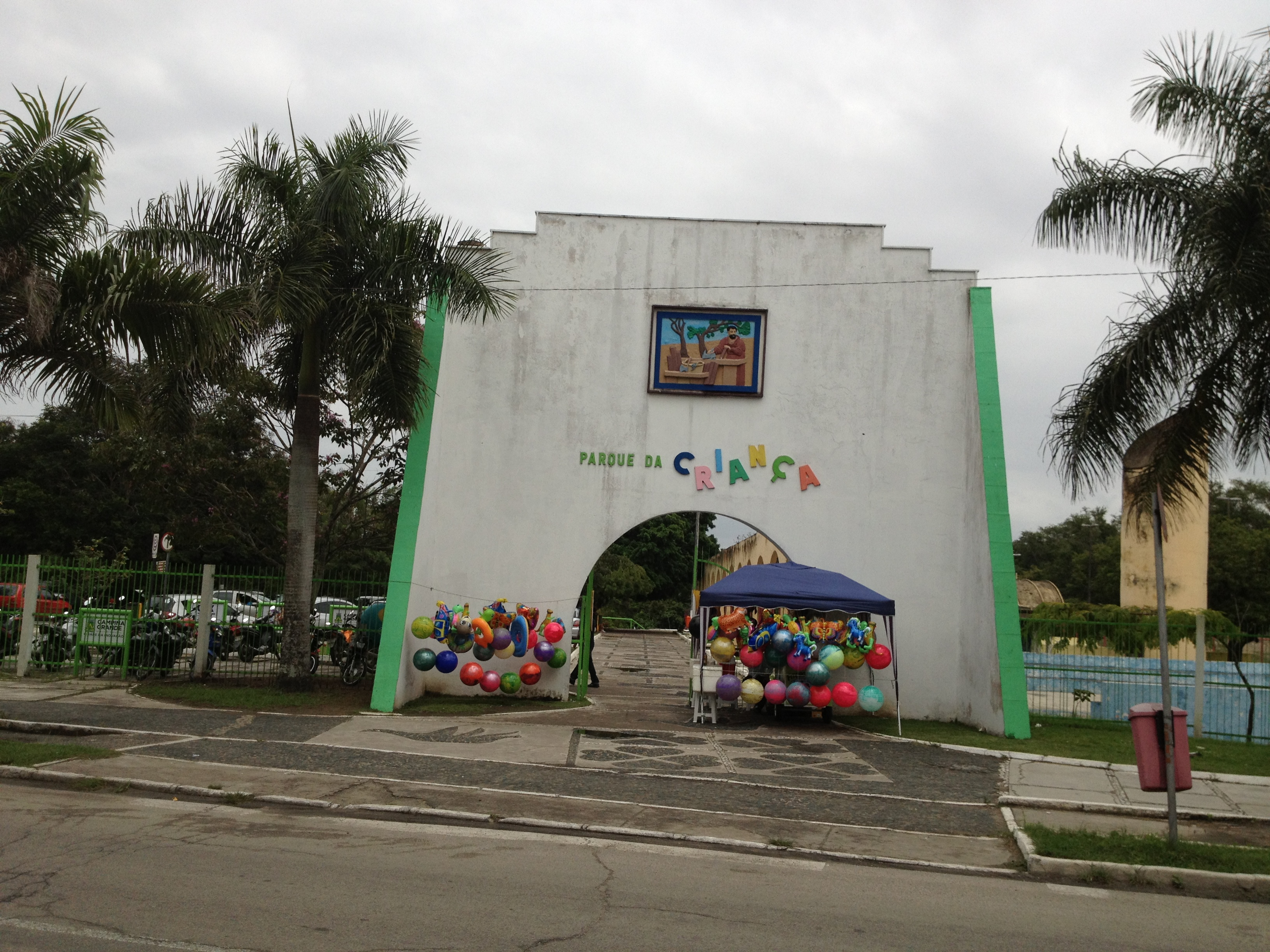 Parque da Criança construído na administração do Prefeito Felix Araújo no ano de 1993.